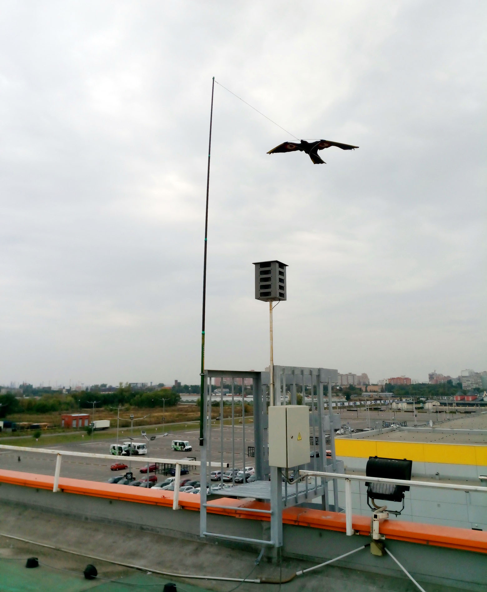 Муляж летящего ястреба для отпугивания птиц